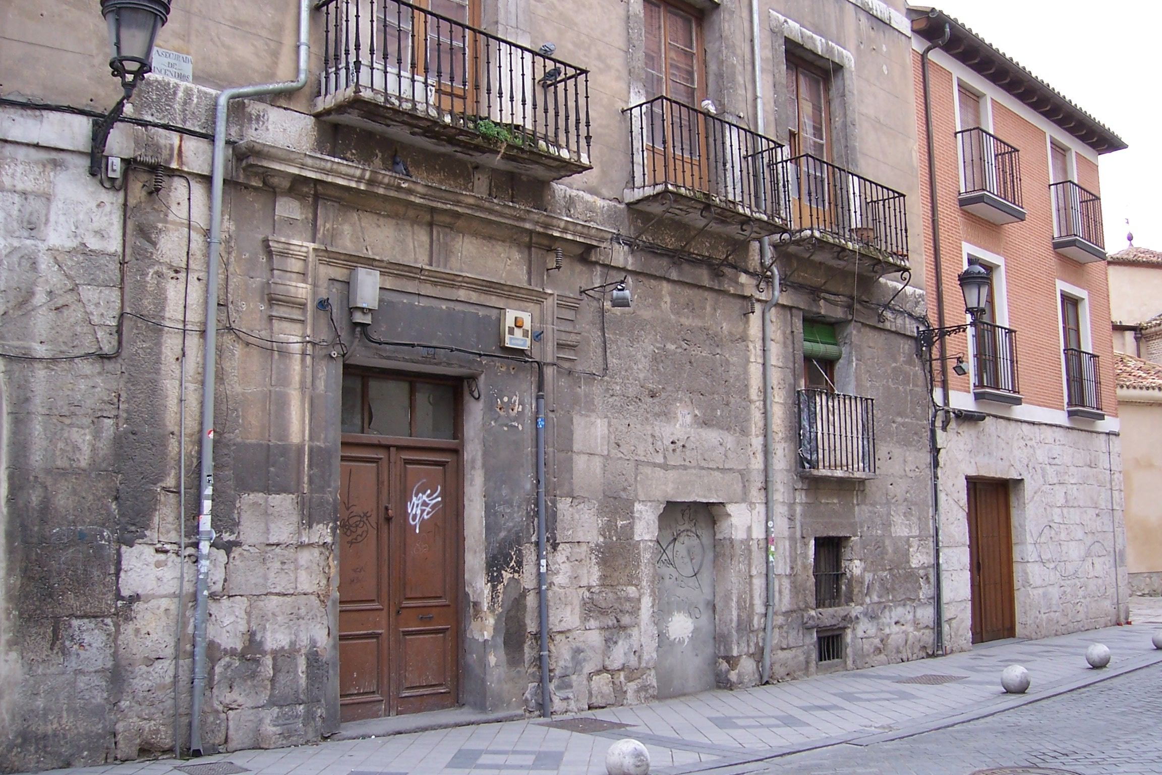 En la calle de San Martín en el nº 14 está todavía el edificio del siglo XVII del secretario Alonso Arias. Valladolid, España